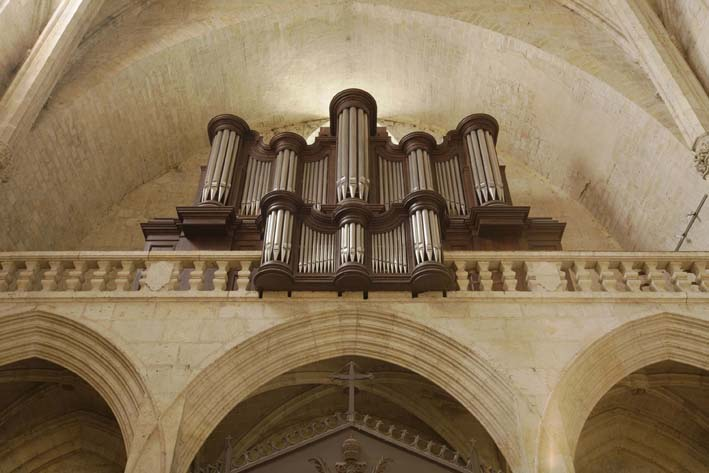 Lectoure (Gers, France), cathédrale Saint Gervais - Saint Protais, orgue d'Auguste Phébade de 1843, modifié à deux reprises par Jules Magen en 1858 & 1893, restauré en 1987 par Pierre Vialle.